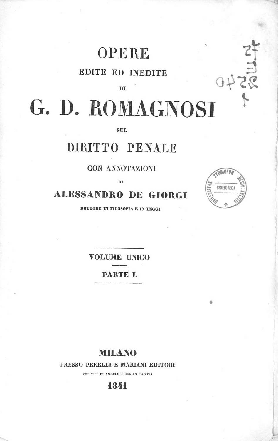 Frontespizio